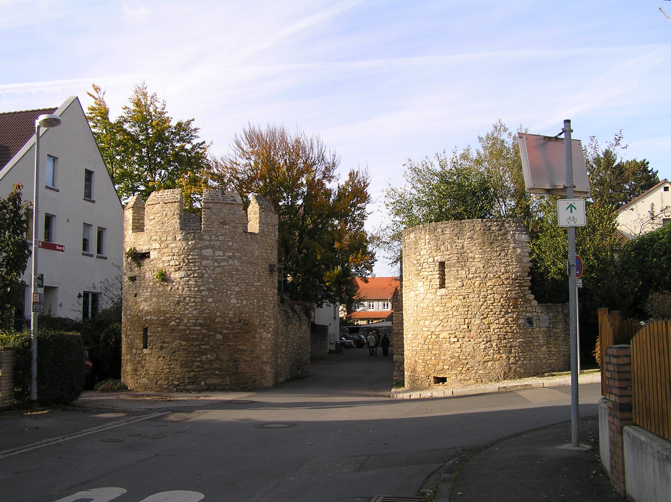 Stiegelgässer Tor (auch Stiegelpforte) vom Süden gesehen